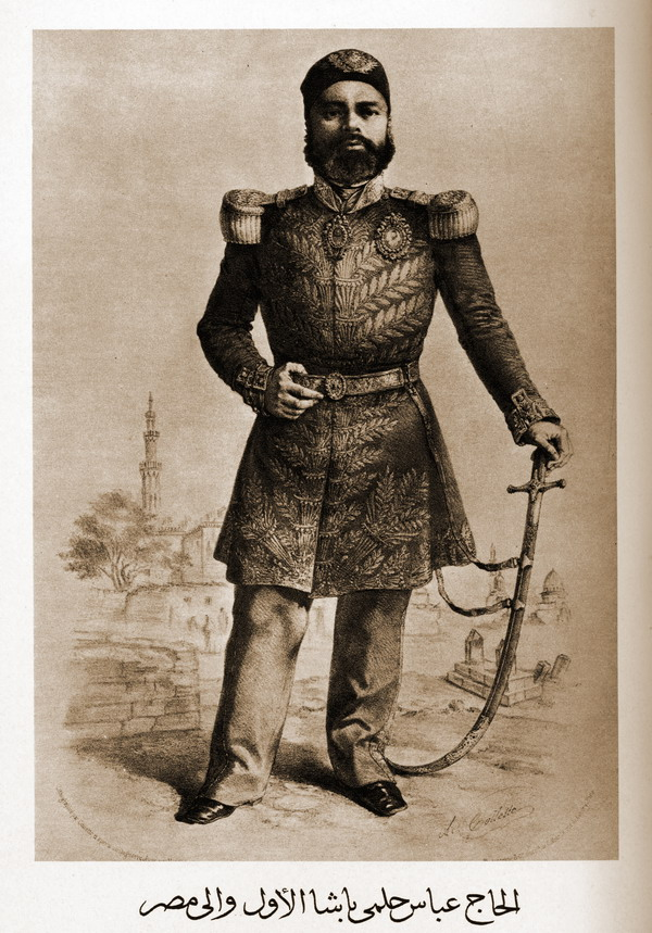 Der ägyptische Vizekönig Abbas I. (1812-1854)